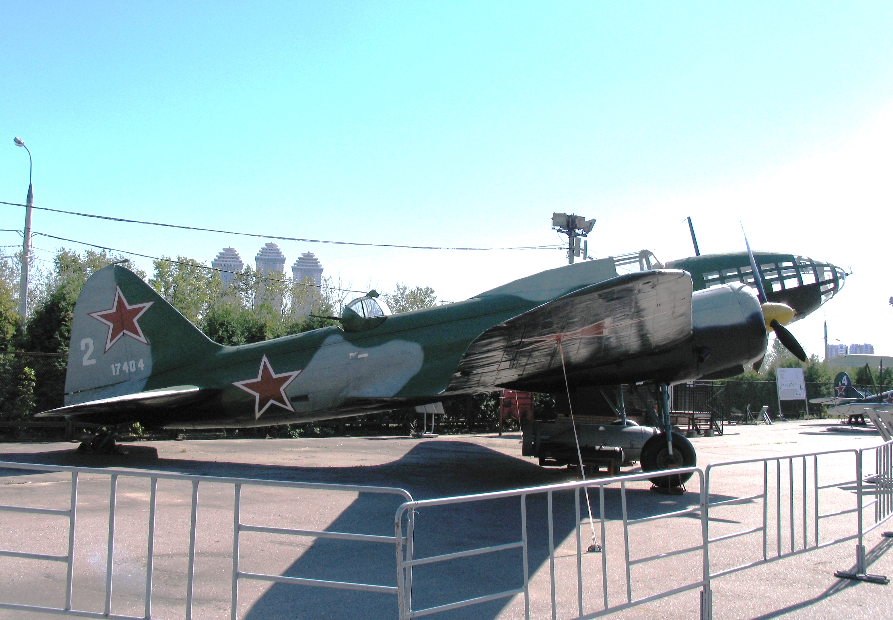 Il-4 view in Moscow / На Поклонной горе